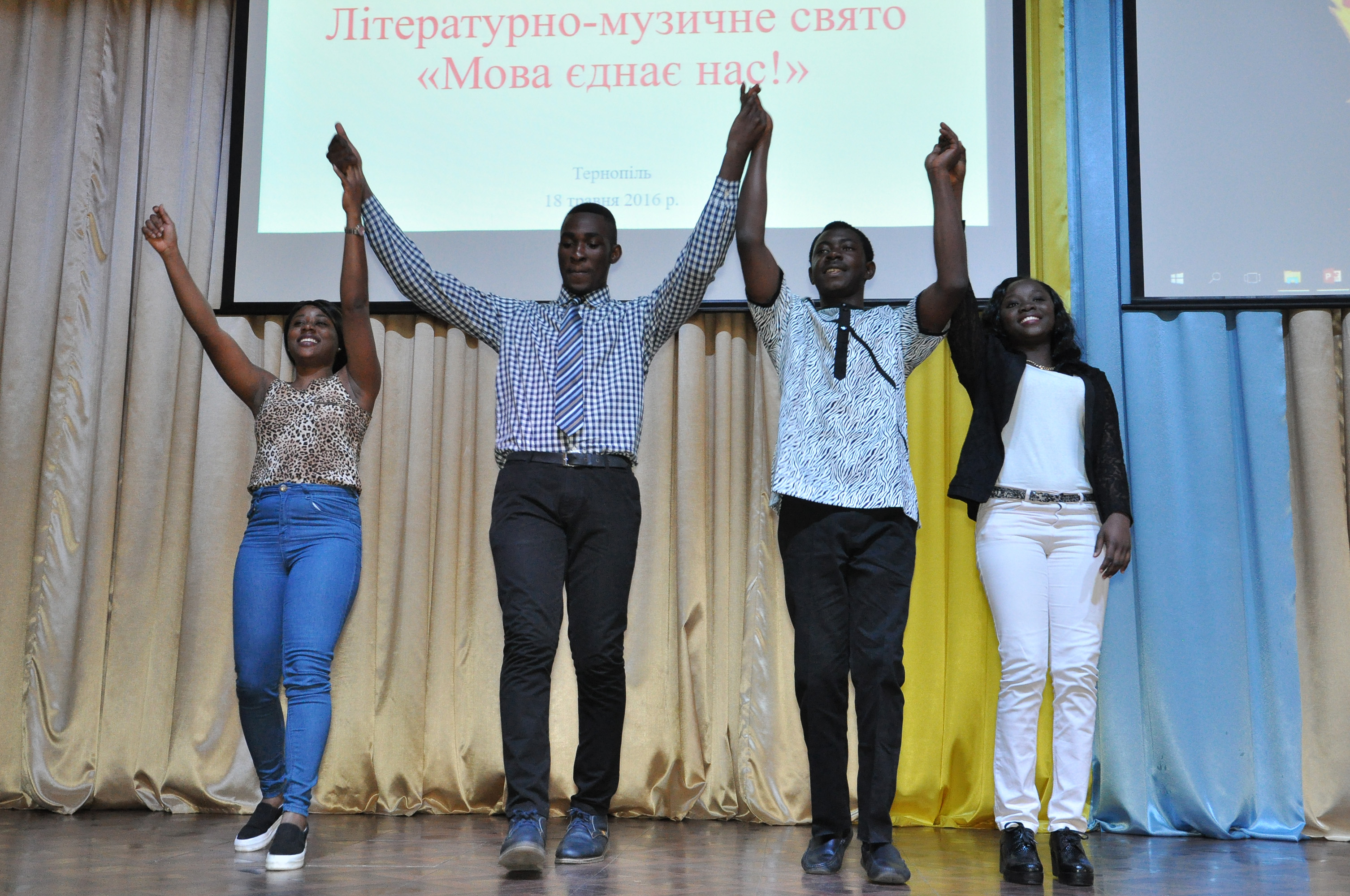 Літературно-музичне свято «Мова єднає нас», зорганізоване слухачами підготовчого відділення факультету іноземних студентів ТДМУ.